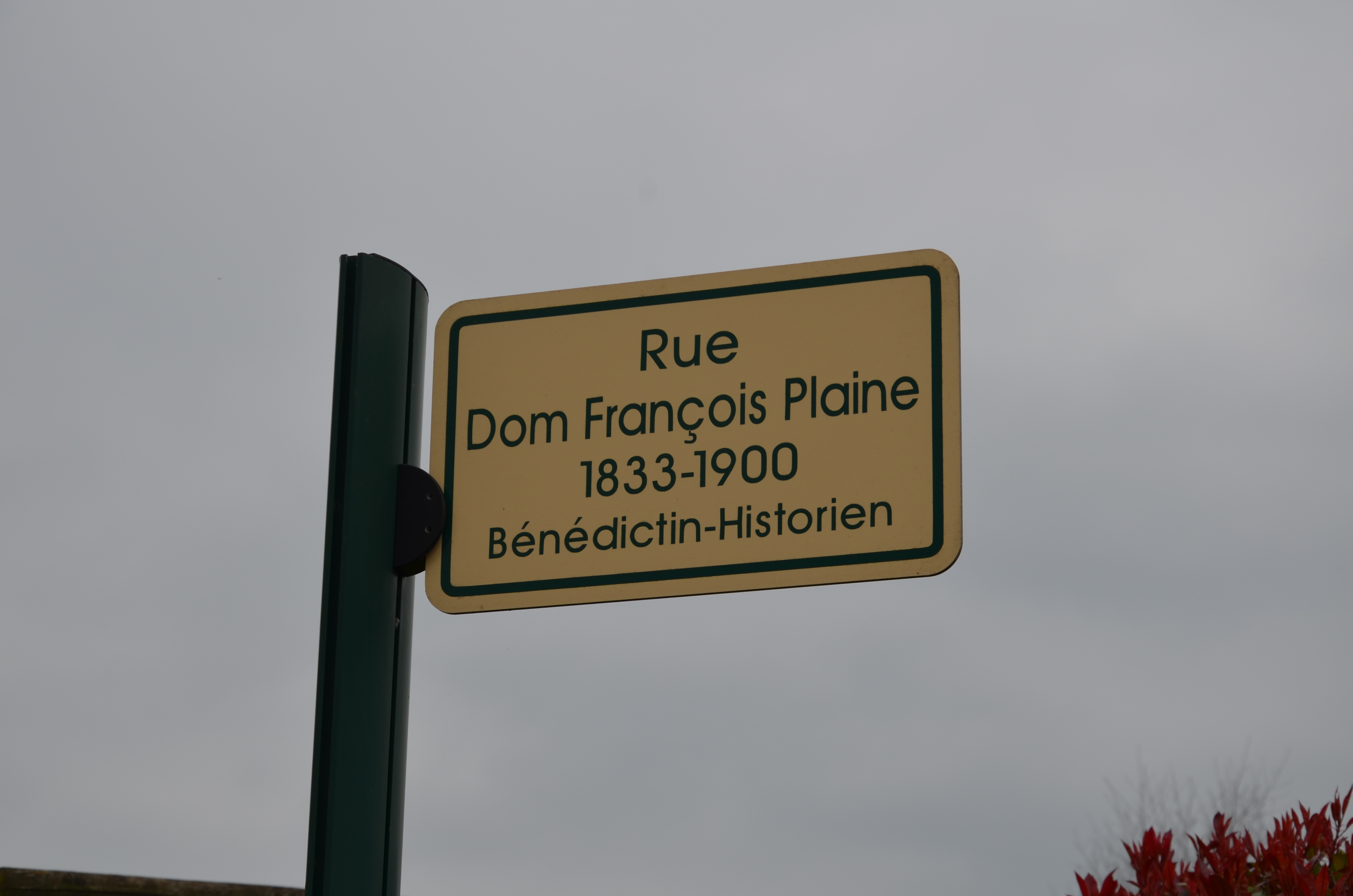 Plaque de rue Dom François Plaine à Bédée.